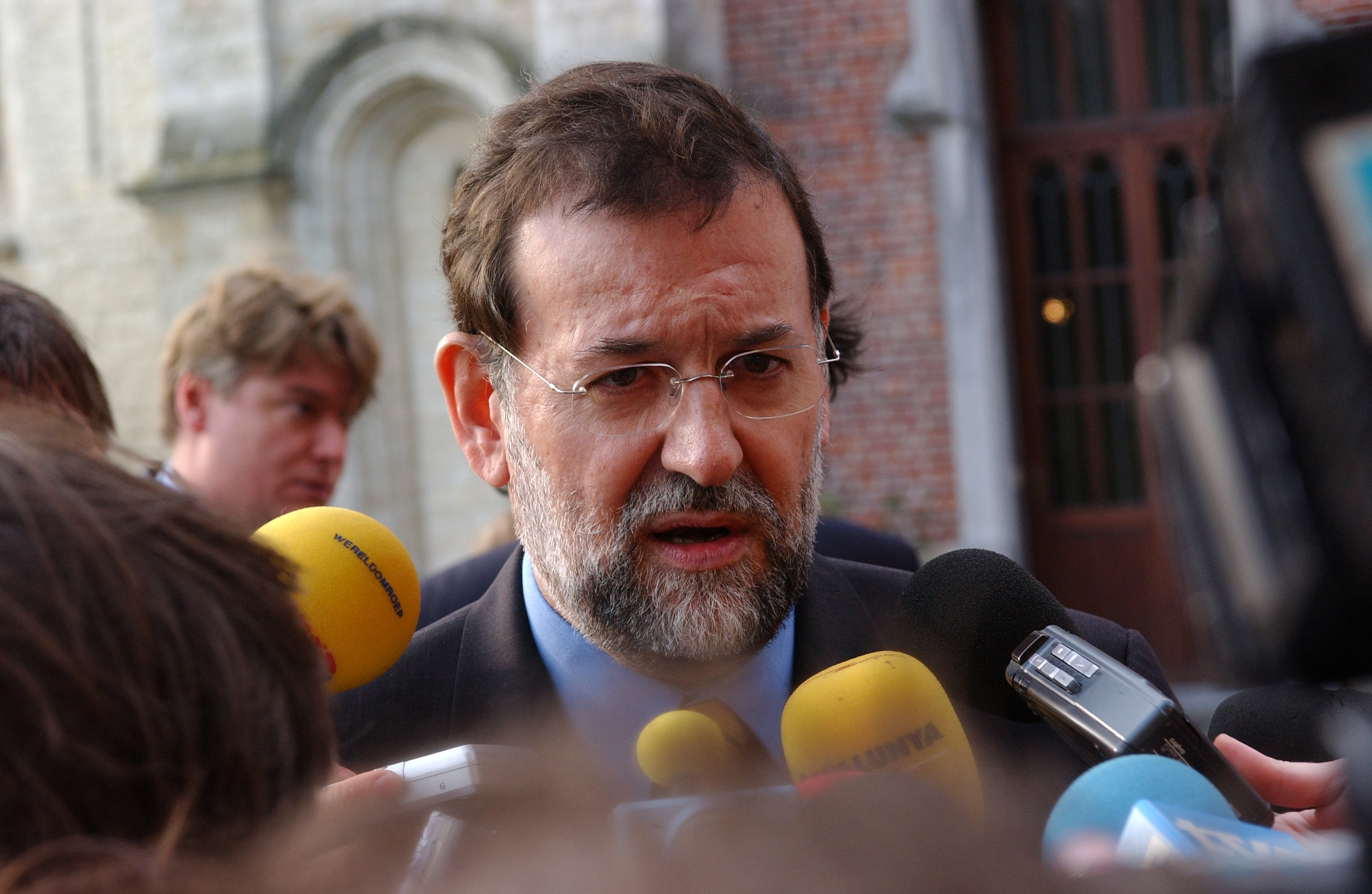 EPP Summit Meise 16 December 2004